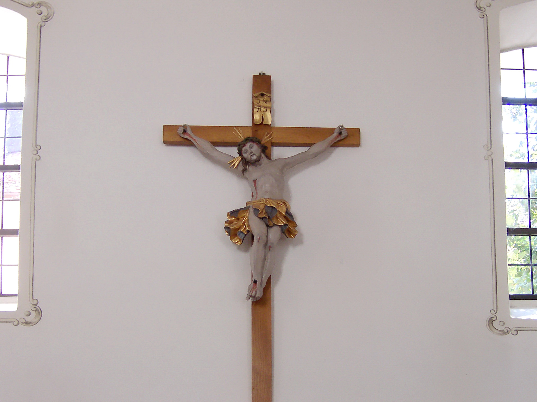 Ergoldsbach, Friedhofstraße 29. Katholische Kapelle St. Agatha. Im Kern mittelalterlicher Bau, 1726 barockisiert. Kruzifix an der Südwand des Langhauses.